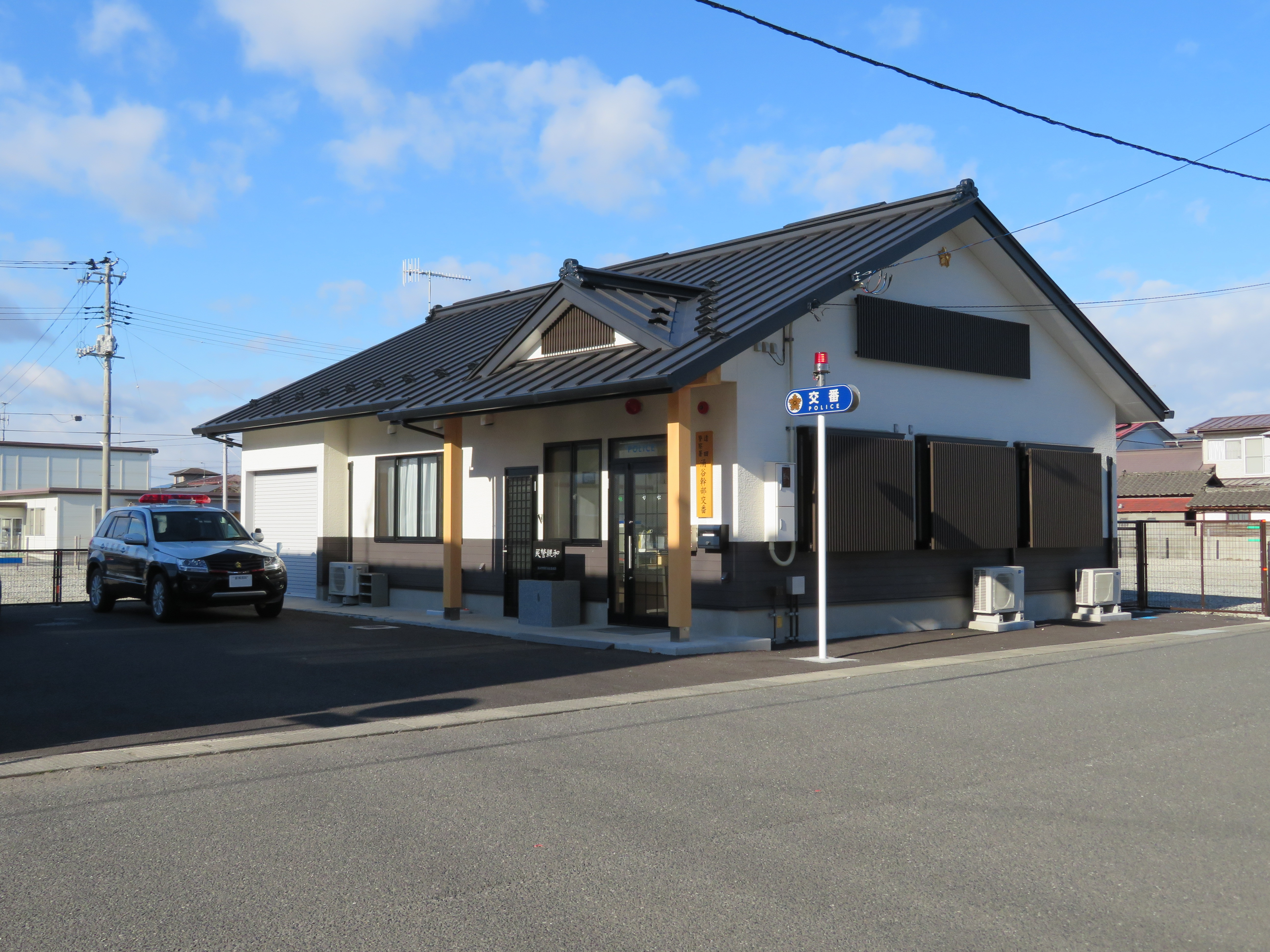 遠田警察署涌谷幹部交番庁舎